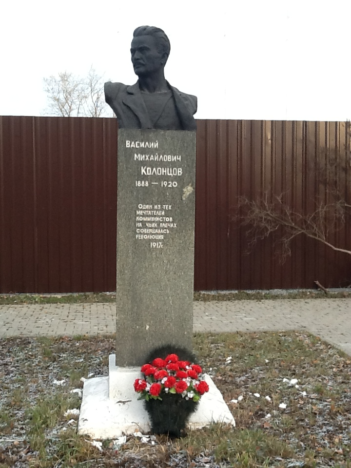 Колонцов Василий Михайлович (бюст установлен на улице Колонцова, г.Мытищи, Московская область)